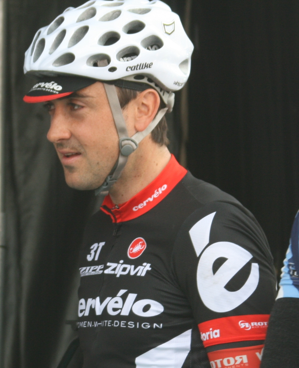 Hayden Roulston au E3 Prijs 2009